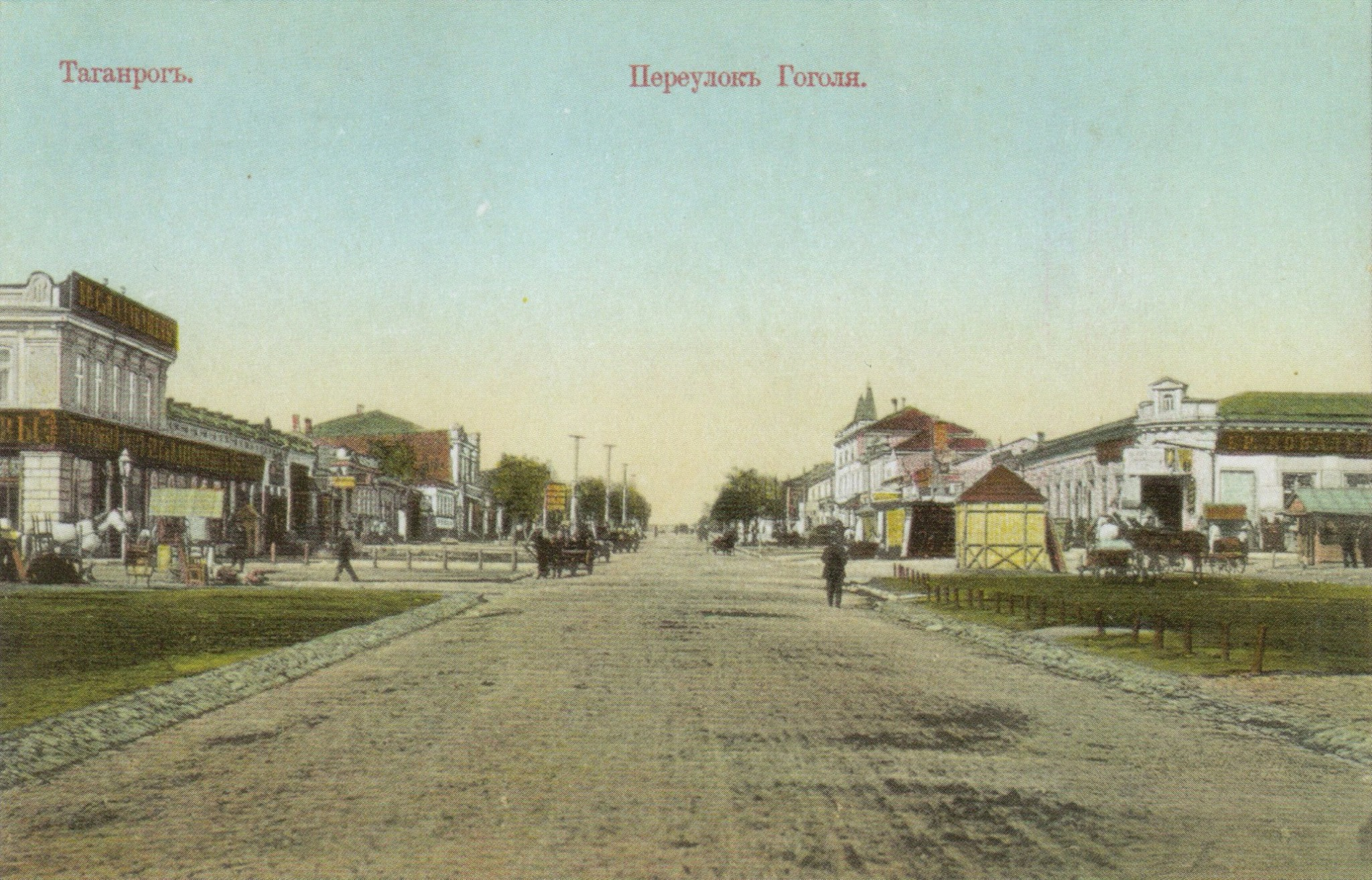 Переулок Гоголя, Таганрог Ростовская область РФ